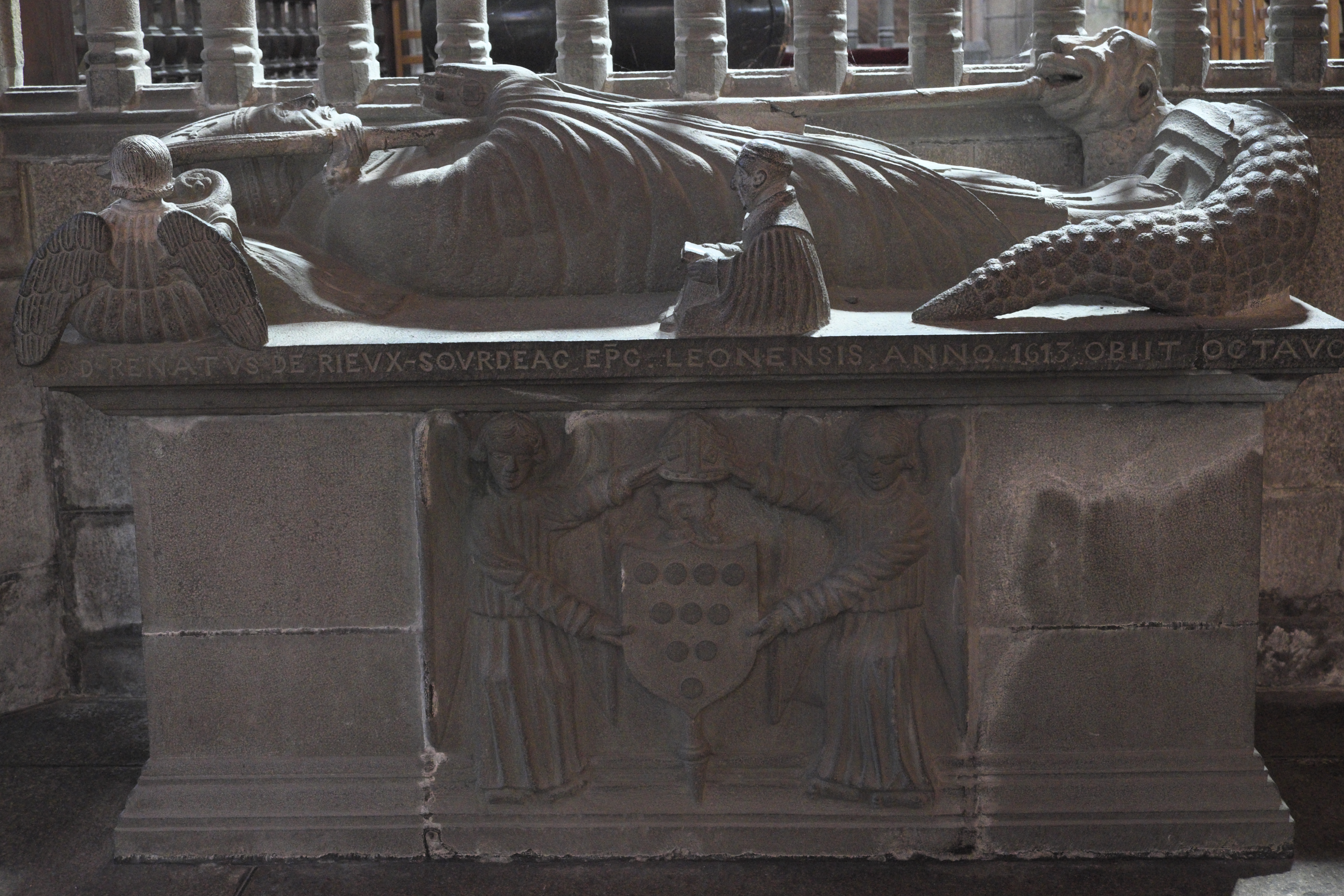 Ehemalige Kathedrale Saint-Paul-Aurélien in Saint-Pol-de-Léon im Département Finistère (Region Bretagne/Frankreich), Grab des Bischofs René de Rieux-Sourdéac († 1651)